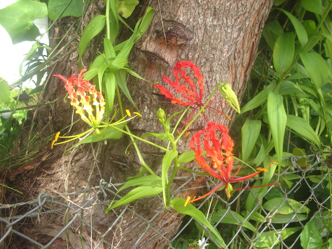 Gloriosa superba (lile veʻemoa, in a graden in Nukuʻalofa, Tonga)